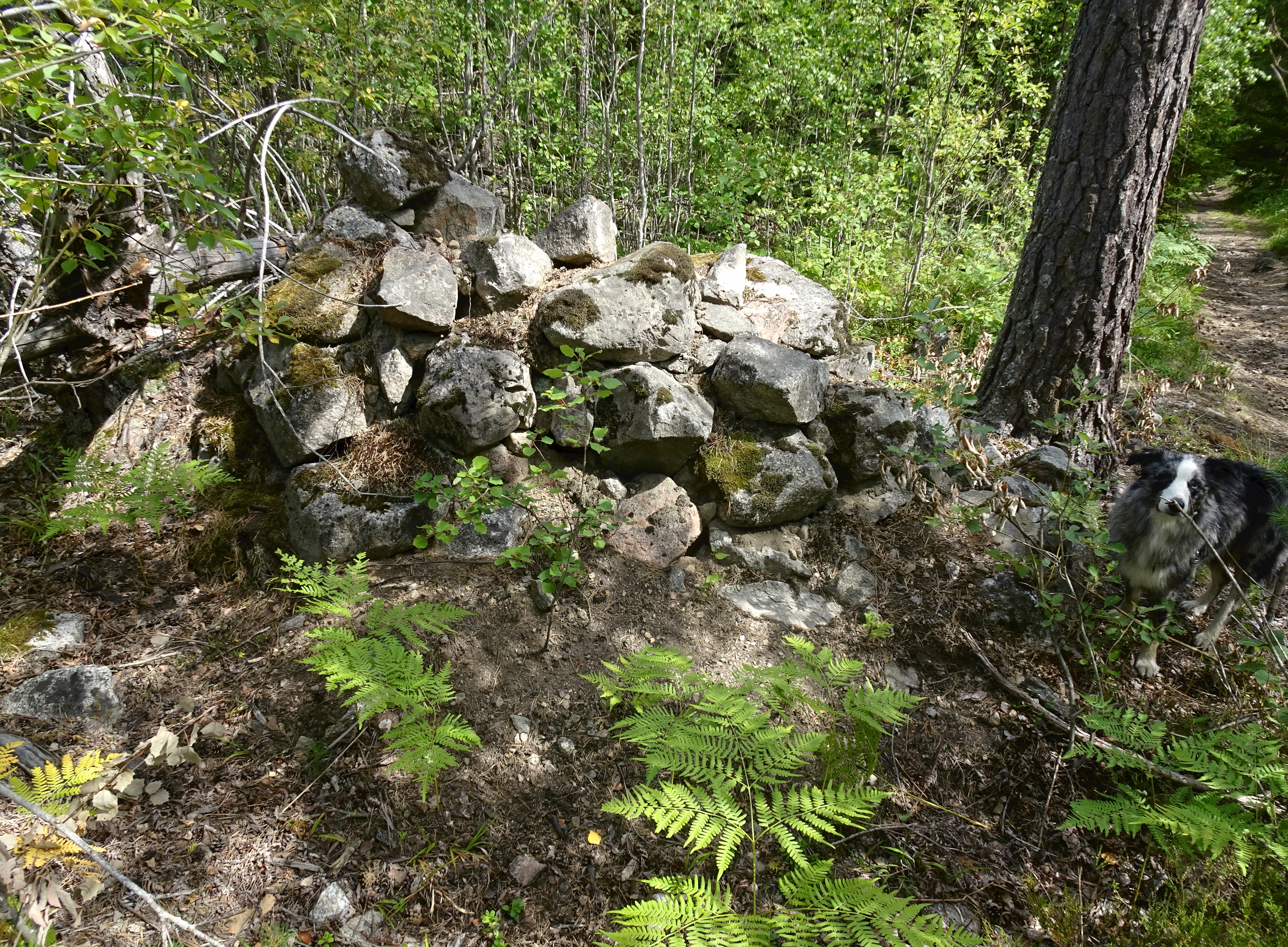 Ryssugn i Tyresta nationalpark (RAÄ-nummer Tyresö 116:1)